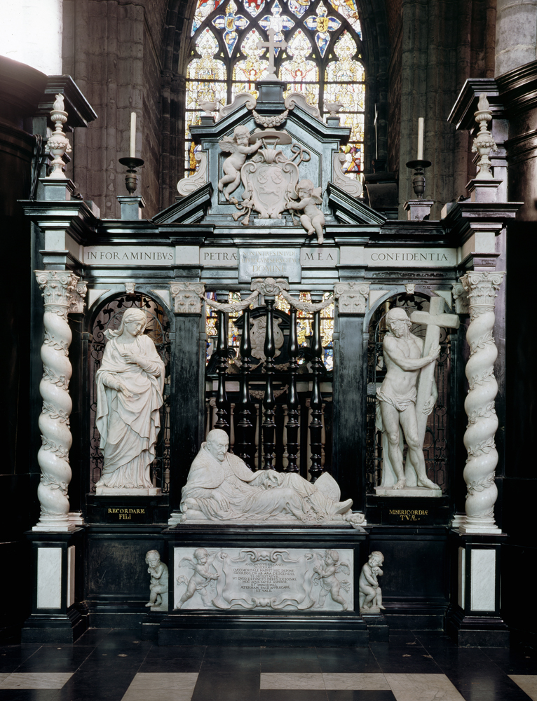 Sint-Baafskathedraal, Gent Jeroom Du Quesnoy de jonge, Praalgraf van Antonius Triest, 1652-1654; inv nr: 237